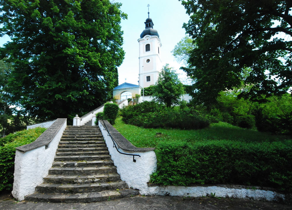 Die Pfarrkirche von Eibenstein an der Thaya in Niederösterreich. This media shows the natural monument in Lower Austria with the ID WT-070.